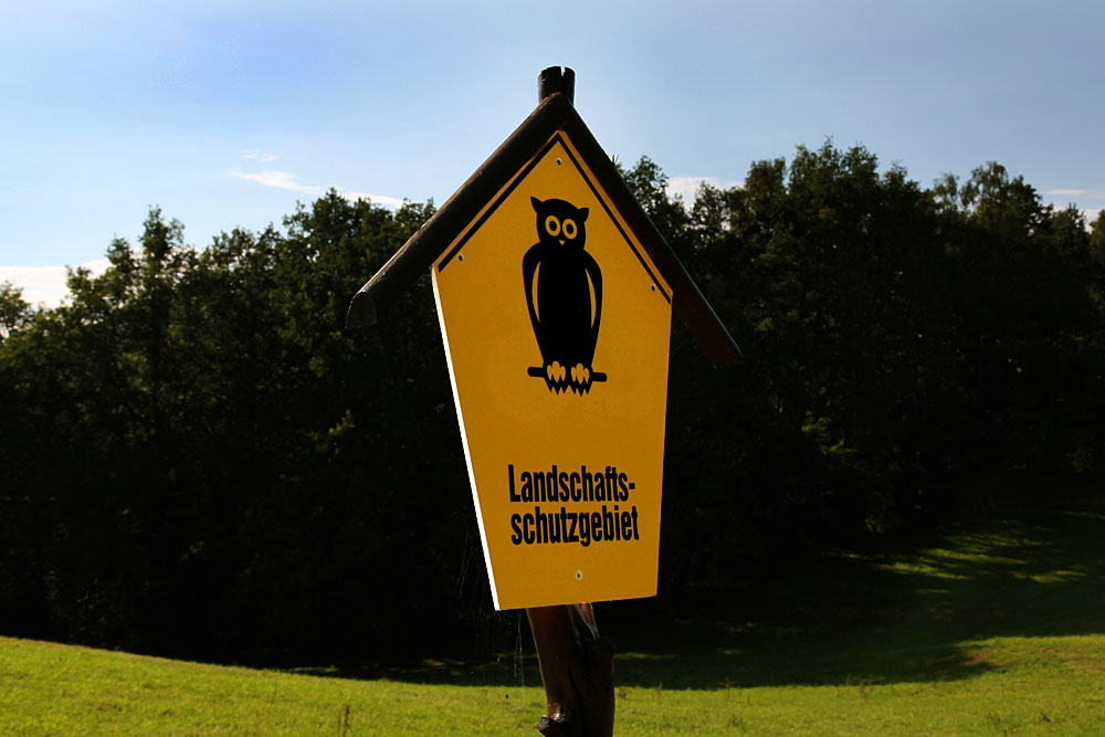 Hüttertal, Schild Landschaftsschutzgebiet, Sachsen